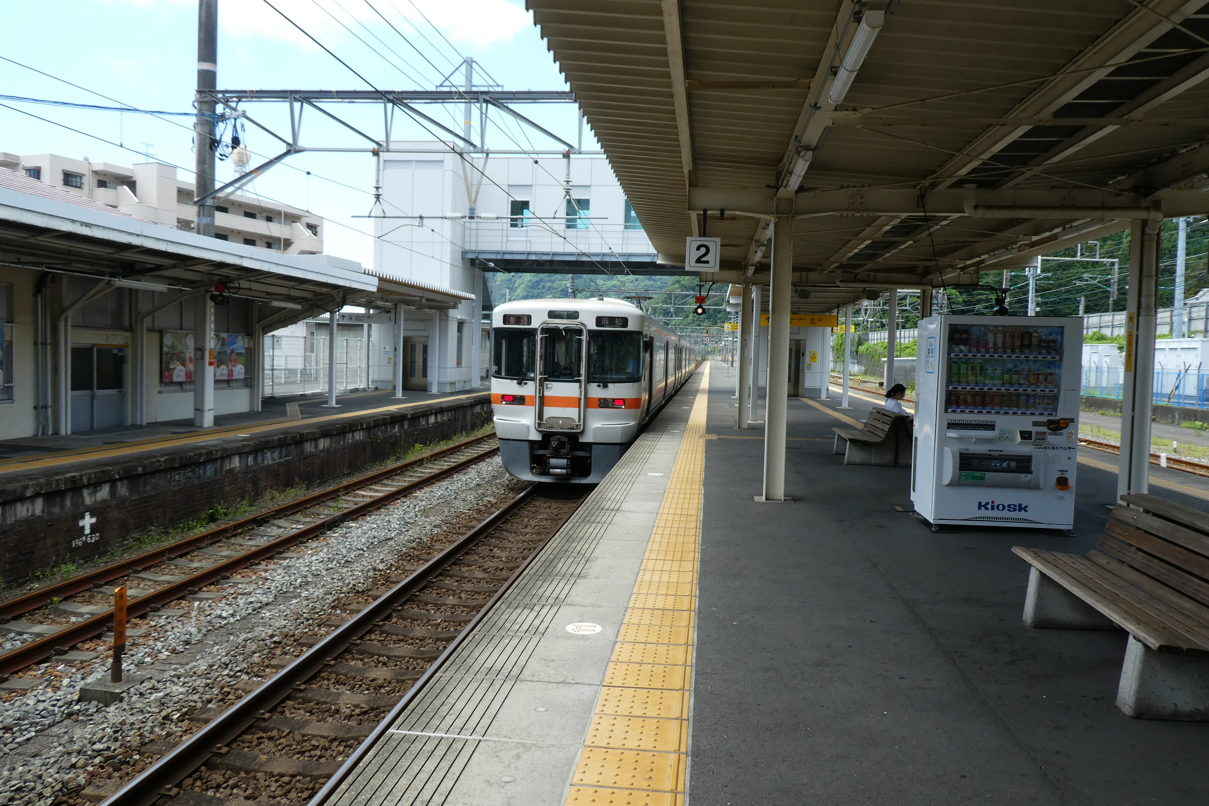 JR東海 用宗駅 プラットホーム